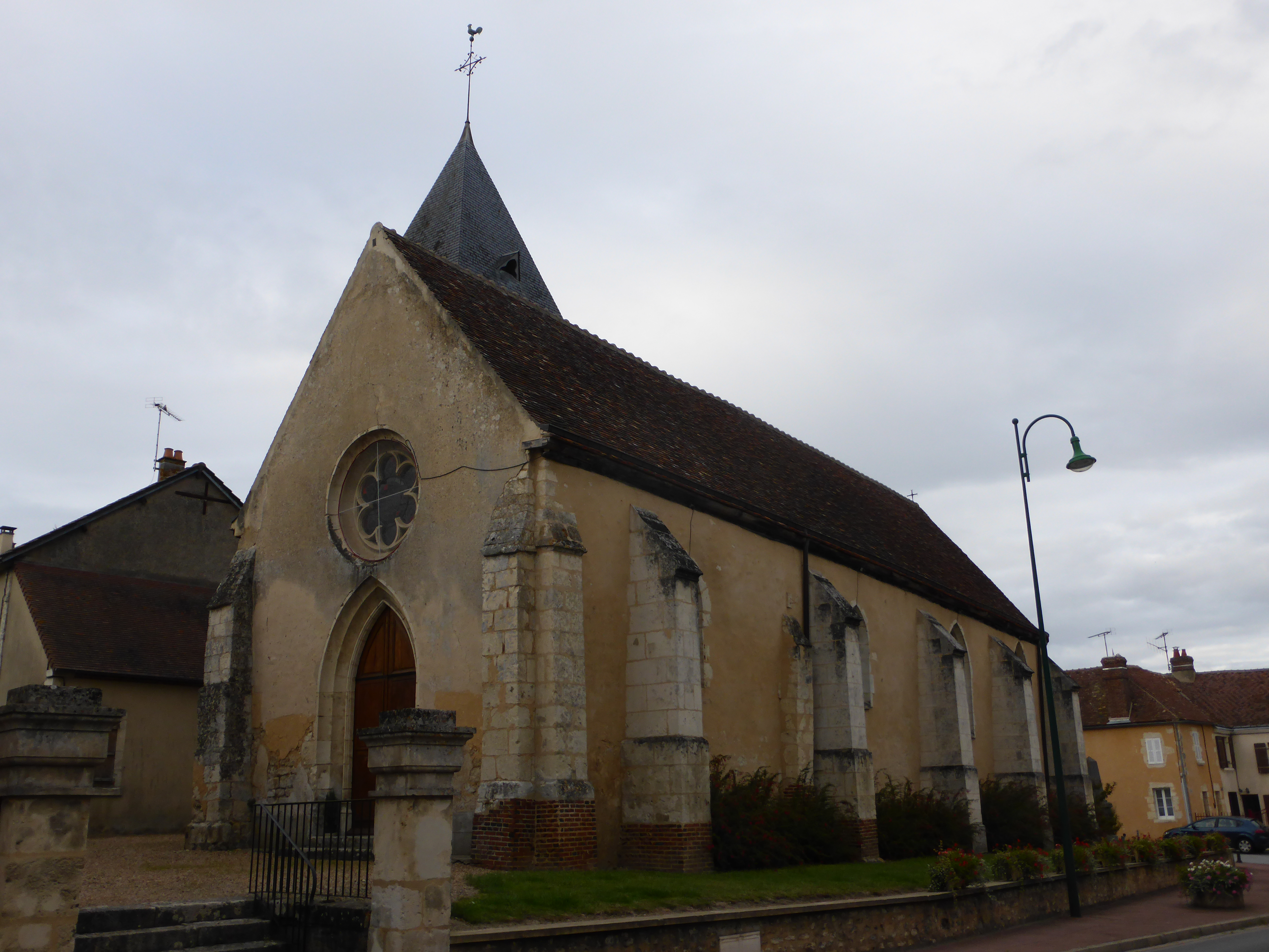 Église Saint-Martin de Berd'huis, dans l'Orne.